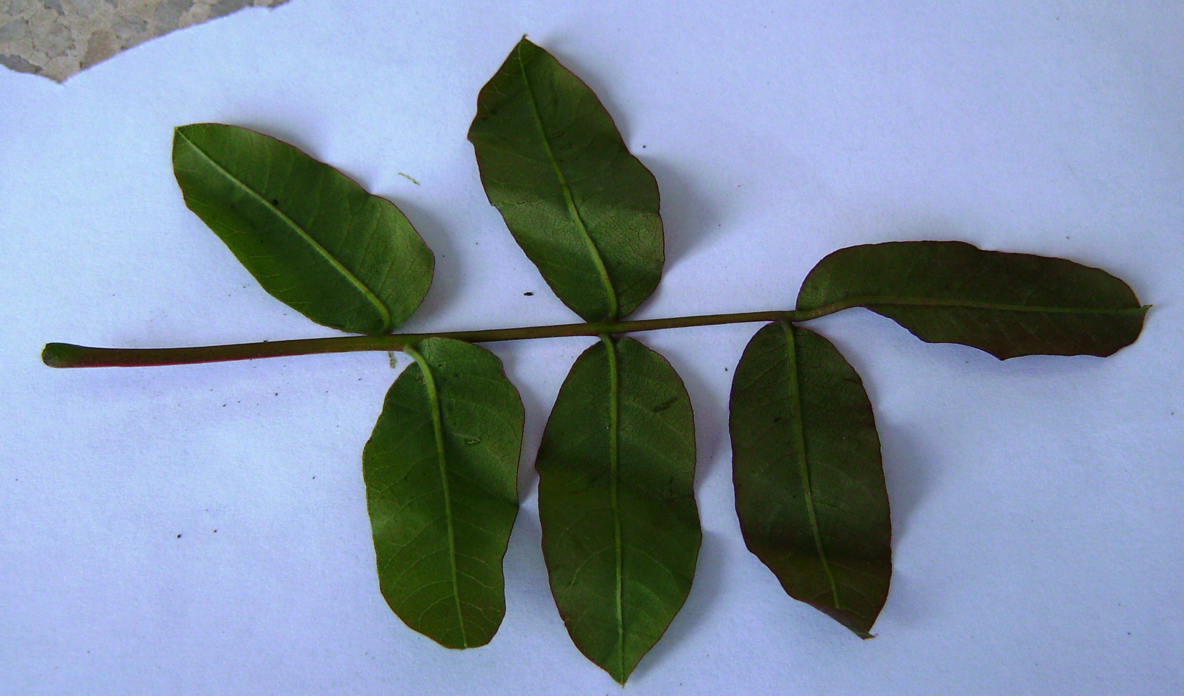 Pistacia terebinthus (Noguerola) reverse leaves,Comarca de la Noguera, Catalonia